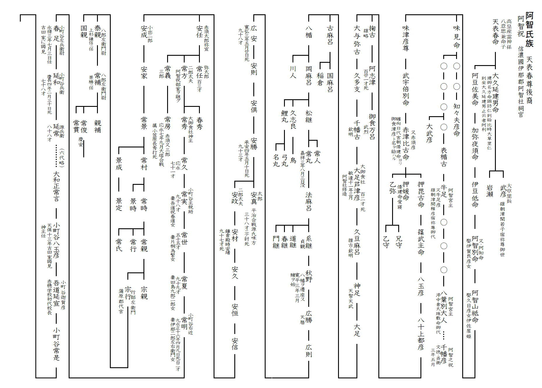 阿智氏族